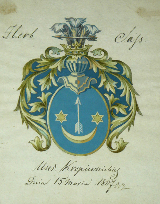 Герб роду Кропивницьких з нобілітаційних документів Кропивницьких